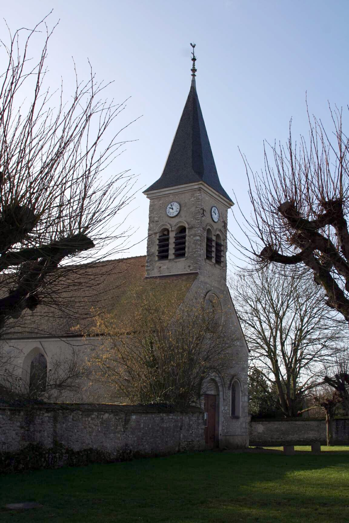 Église de Fontenay-Mauvoisin - Yvelines (France).